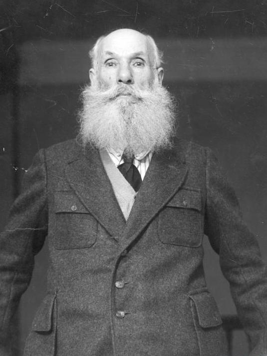 Tomasz Nocznicki - polski polityk ludowy, przywódca PSL "Wyzwolenie", a następnie PSL